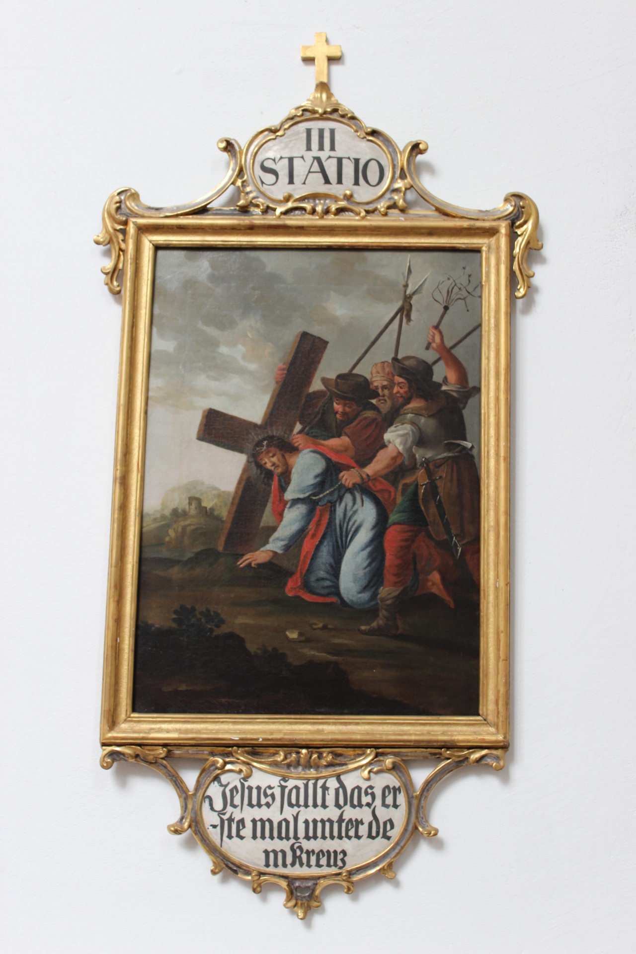 3. Station des Kreuzwegs der Heidelberger Jesuitenkirche